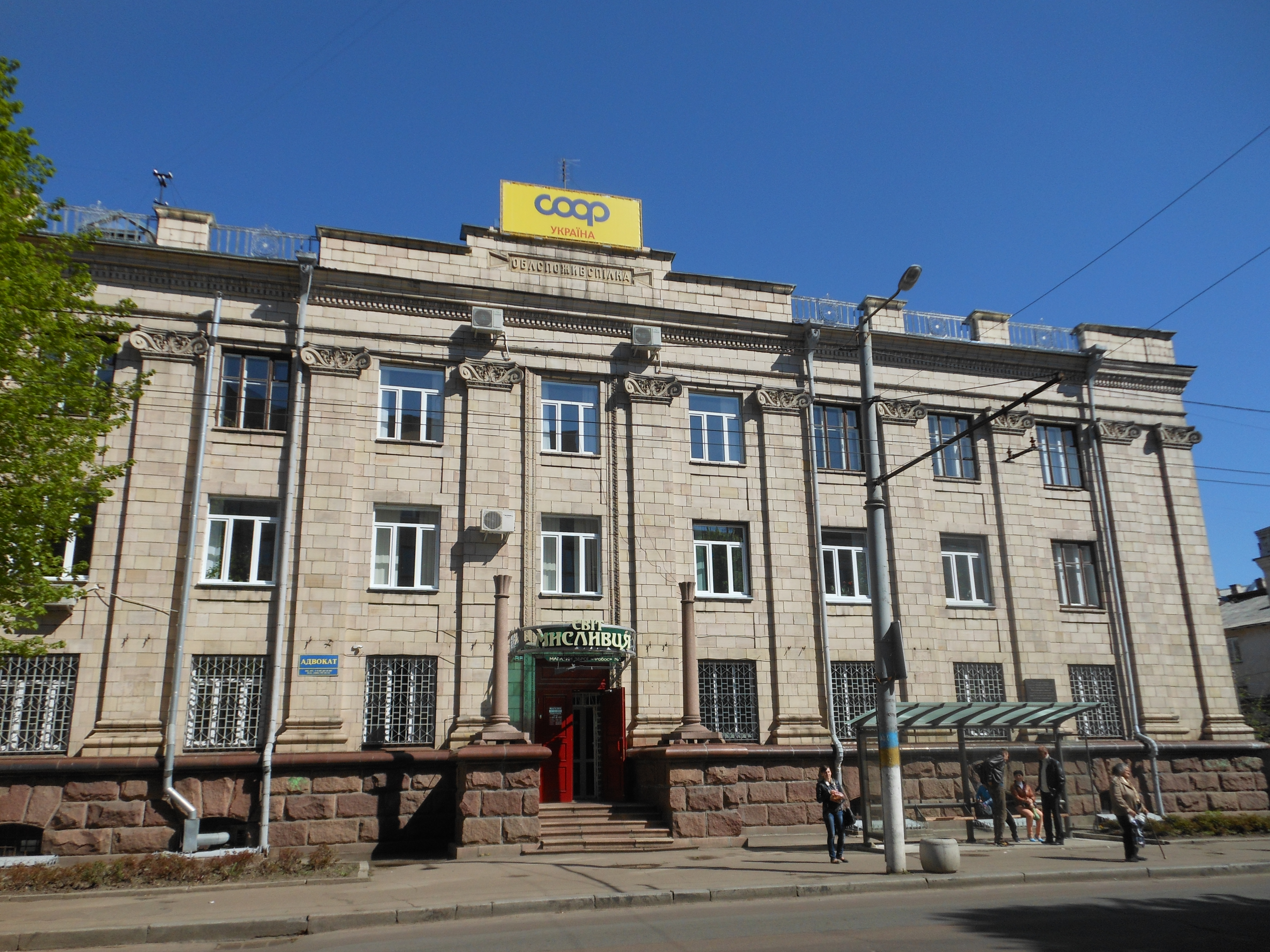 Пам'ятний знак на місці, де знаходився будинок, в якому 10.04.1943 р. відбулася обласна партійна конференція КПУ., Житомир, Вул. В. Бердичівська, 13(Корольовський район)